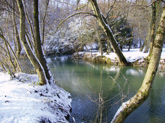 Photo de la Saulx en hiver